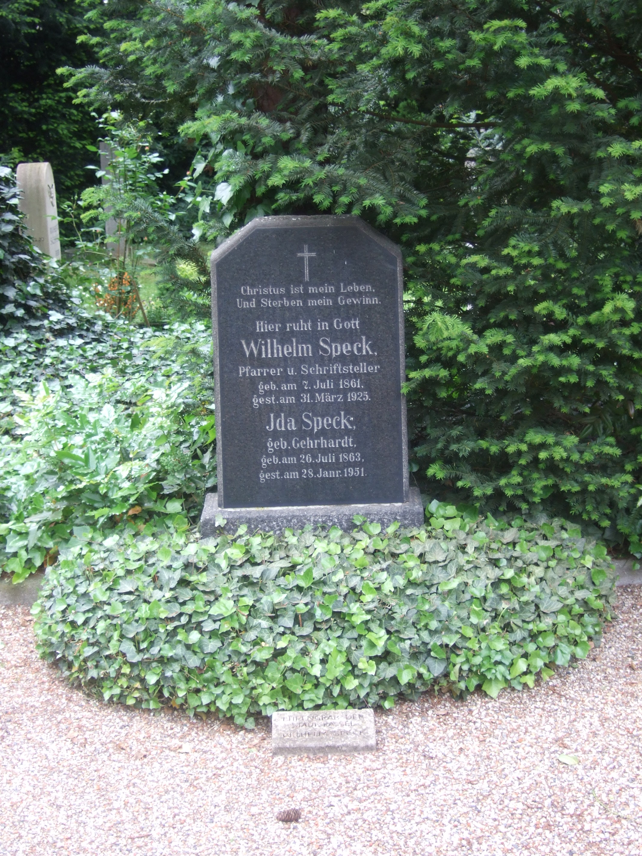 Grab von Wilhelm Speck auf dem Friedhof Wehlheiden.